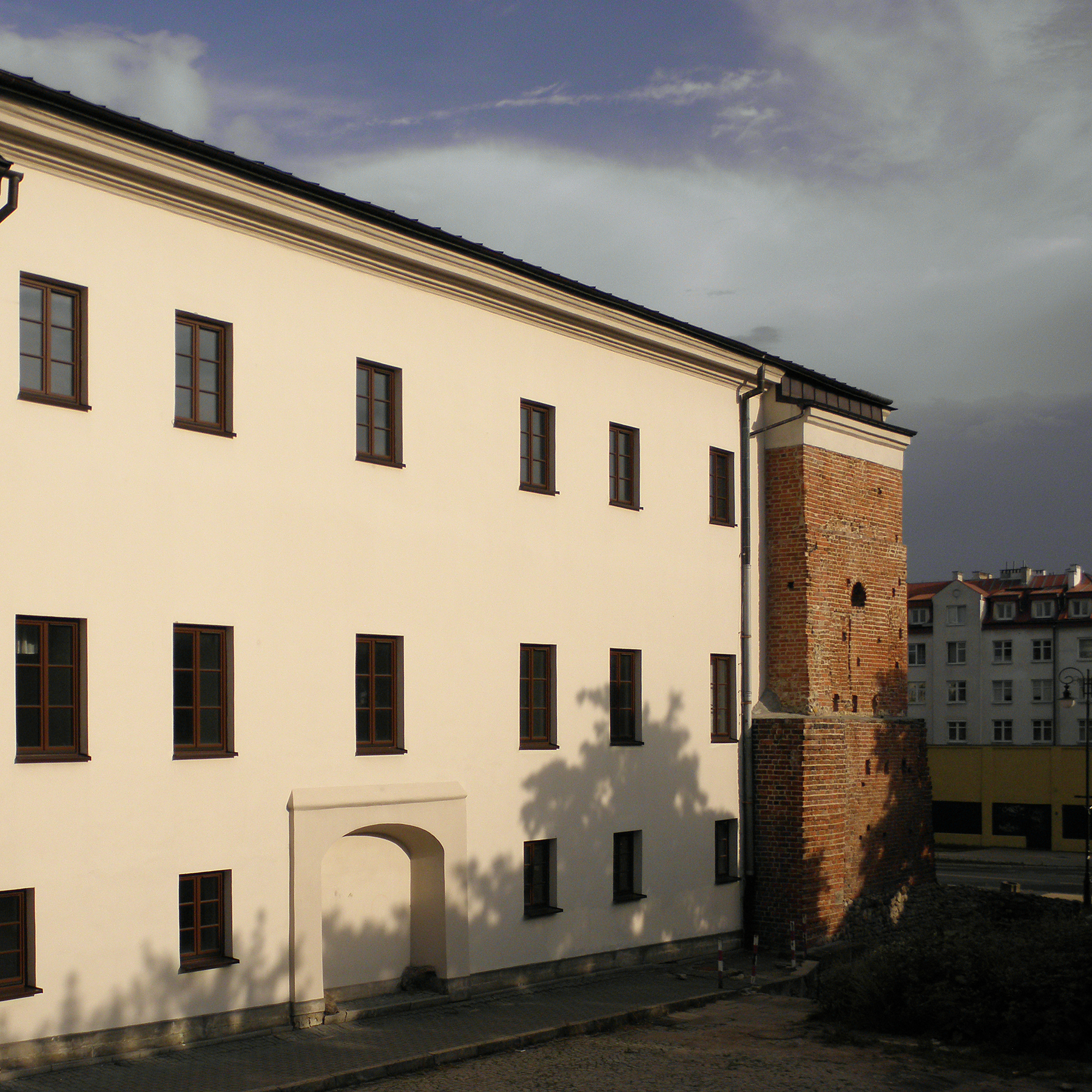 Budynek dawnego zespołu klasztornego pijarów, obecnie Muzeum Regionalne - widok z ul.Żytniej.